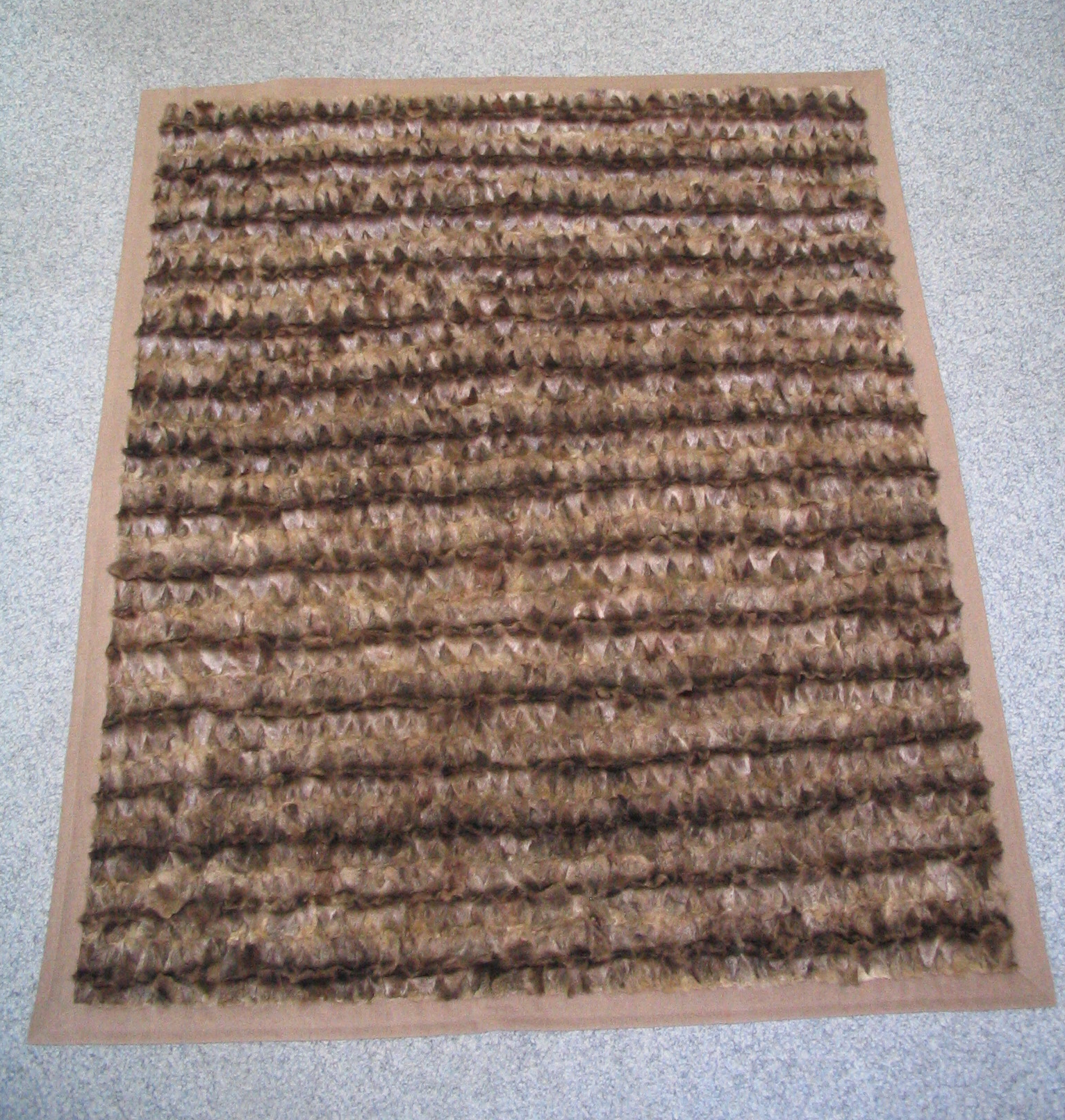 Decke aus Zobelstücken (Stirnen). Gesehen bei Herhold Pelze, Wiesbaden.